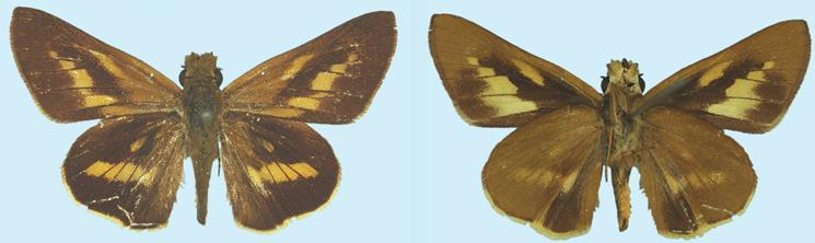 Pastria grinpela upperside (left), underside (right)